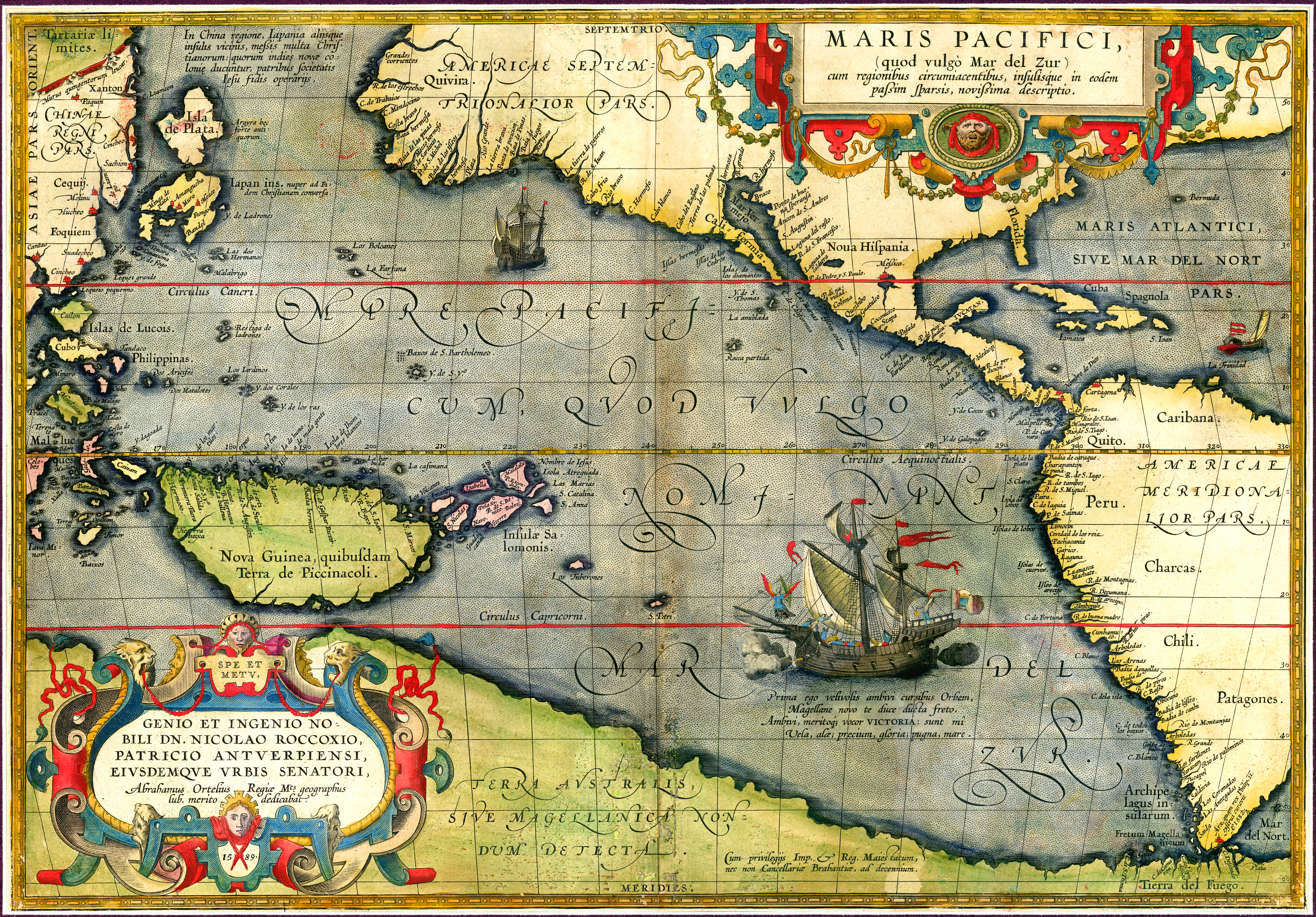 Karte der pazifischen Oceans aus dem Jahr 1589